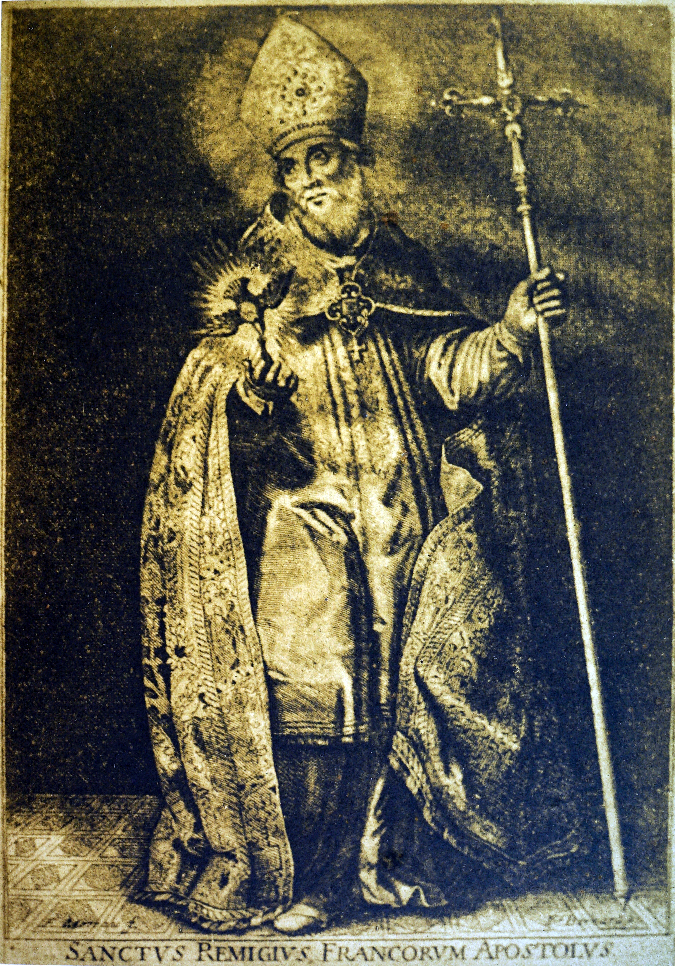 photographié par Varin.